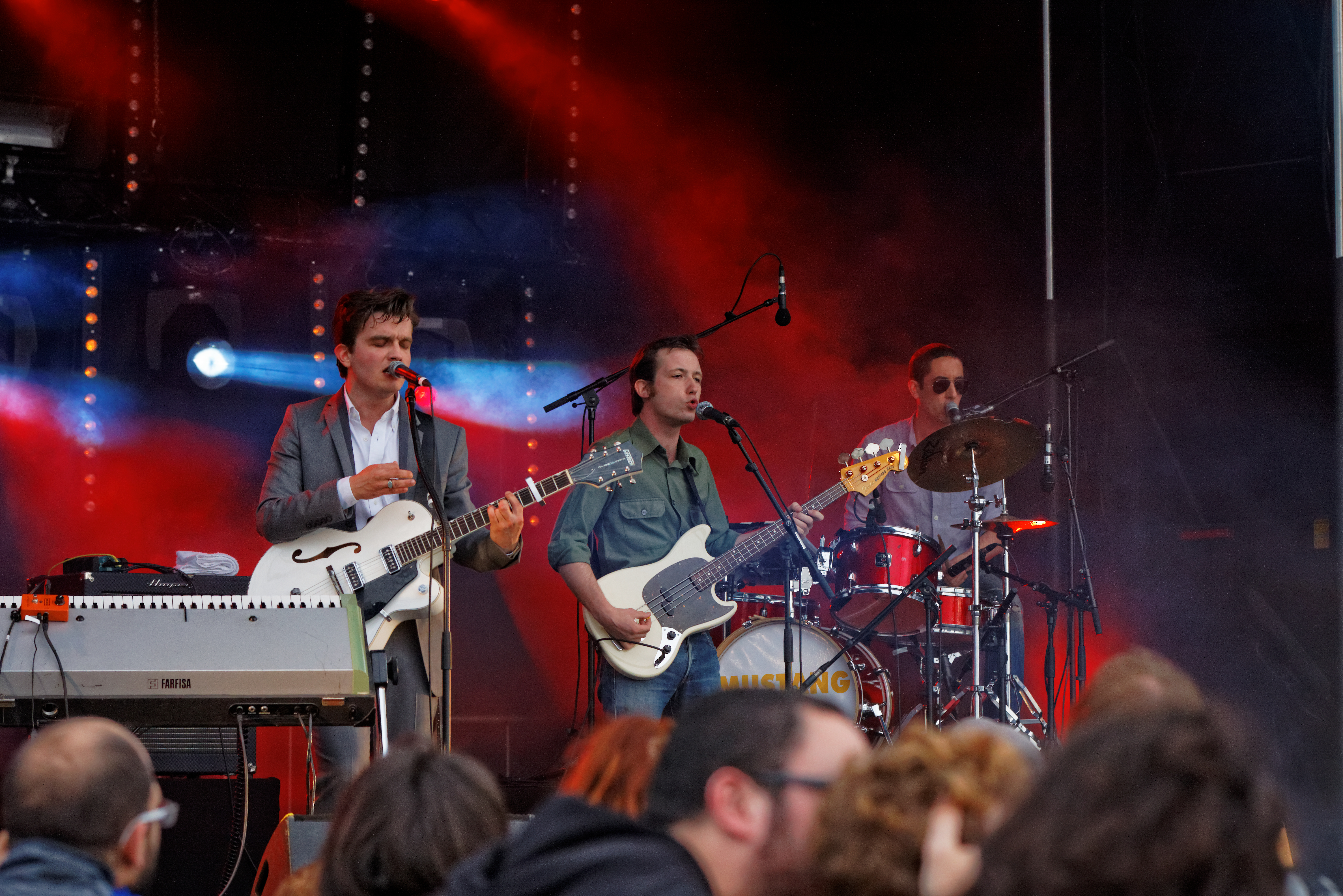 Mustang en concert sur la scène Zebrock lors de la fête de l'Humanité 2012.